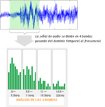 división en 4 bandas frecuenciales